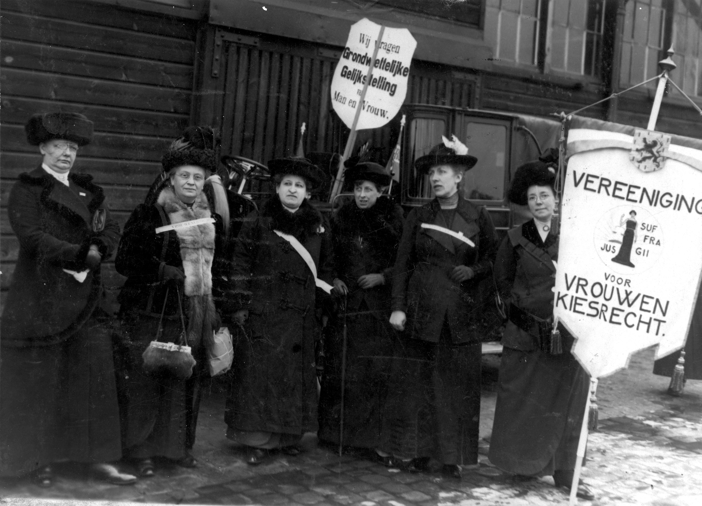 Vrouwenkiesrecht in Nederland. Betoging voor grondwettelijke gelijkstelling van man en vrouw, 1914. Bestuursleden gekleed in wintermantels en allen met hoed, van de "Vereeniging voor Vrouwenkiesrecht", waarvan één het vaandel vasthoudt ("Jus suffragii"). In de auto achter hen een bord met de leuze, "Wij vragen grondwettelijke gelijkstelling van man en vrouw". Vlnr.: mvr. Van Buuren-Huys (eerste secretaris), mvr. P.S. van Balen-Klaar (vice president), dr. Aletta H. Jacobs (president), mvr. C. Mulder van de Graaf-de Bruyn, mej. J.C. van Landschot Hubrechts (tweede secretaris) en jonkvr. S.W.A. Wichers (penningmeester). Amsterdam, februari 1914.